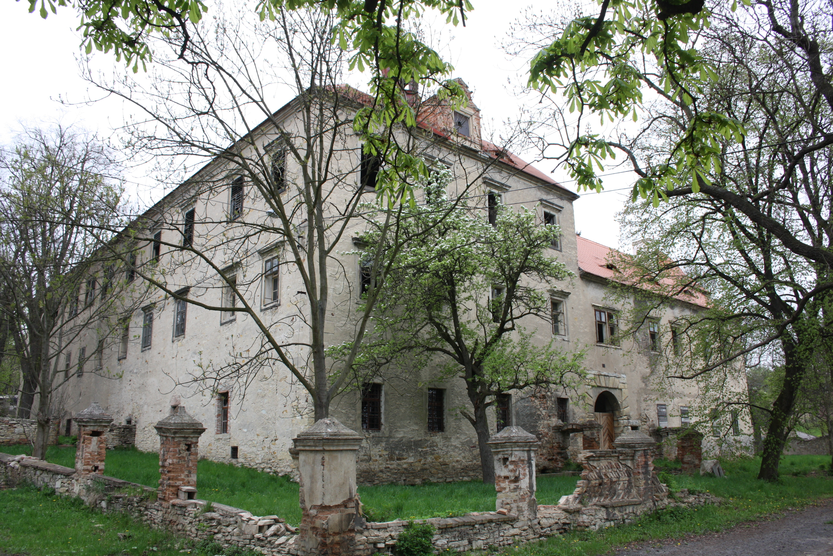 Zámek v Encovanech (pohled od jihozápadu)